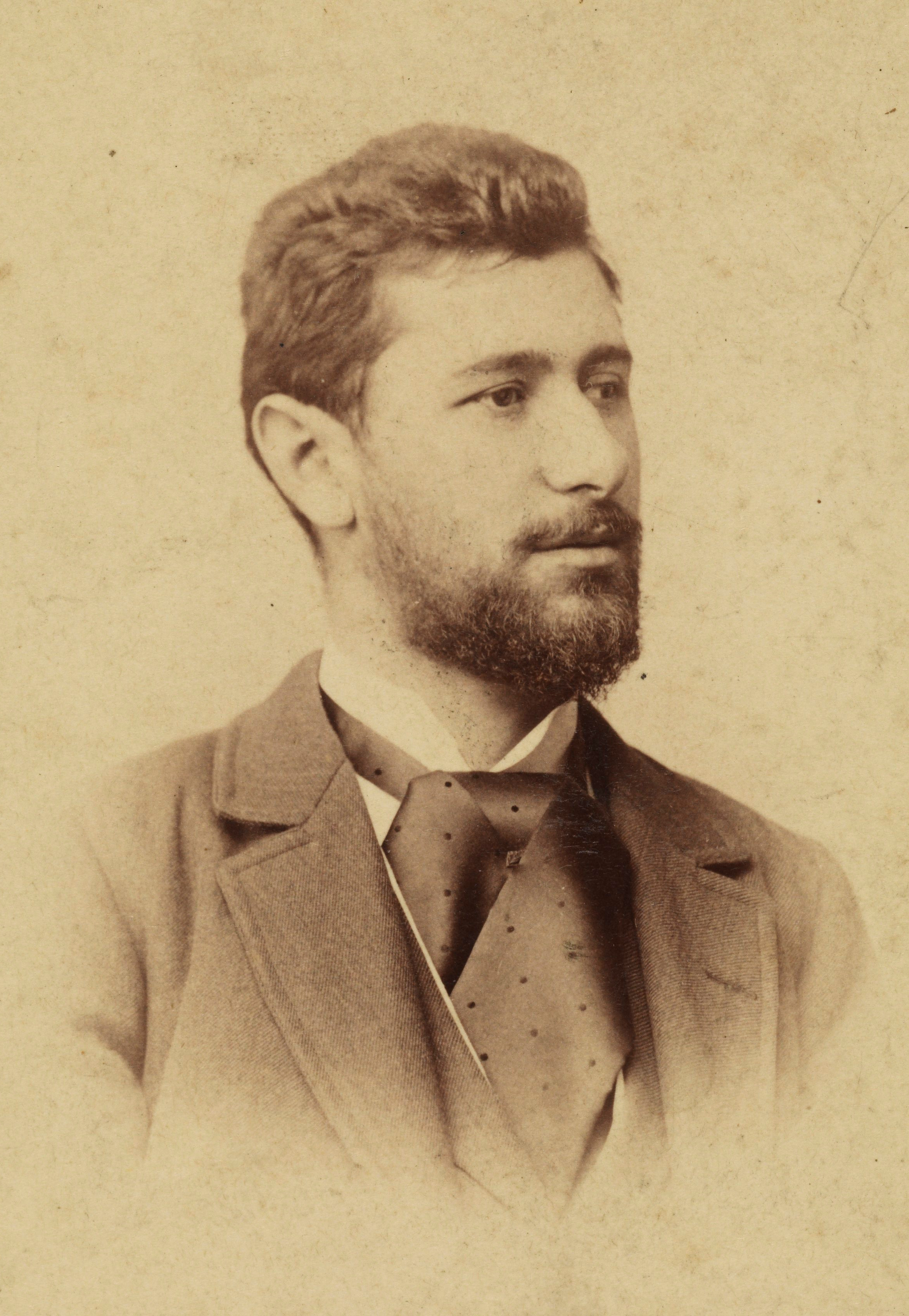 Alfred Zachariewicz, 1893 r.